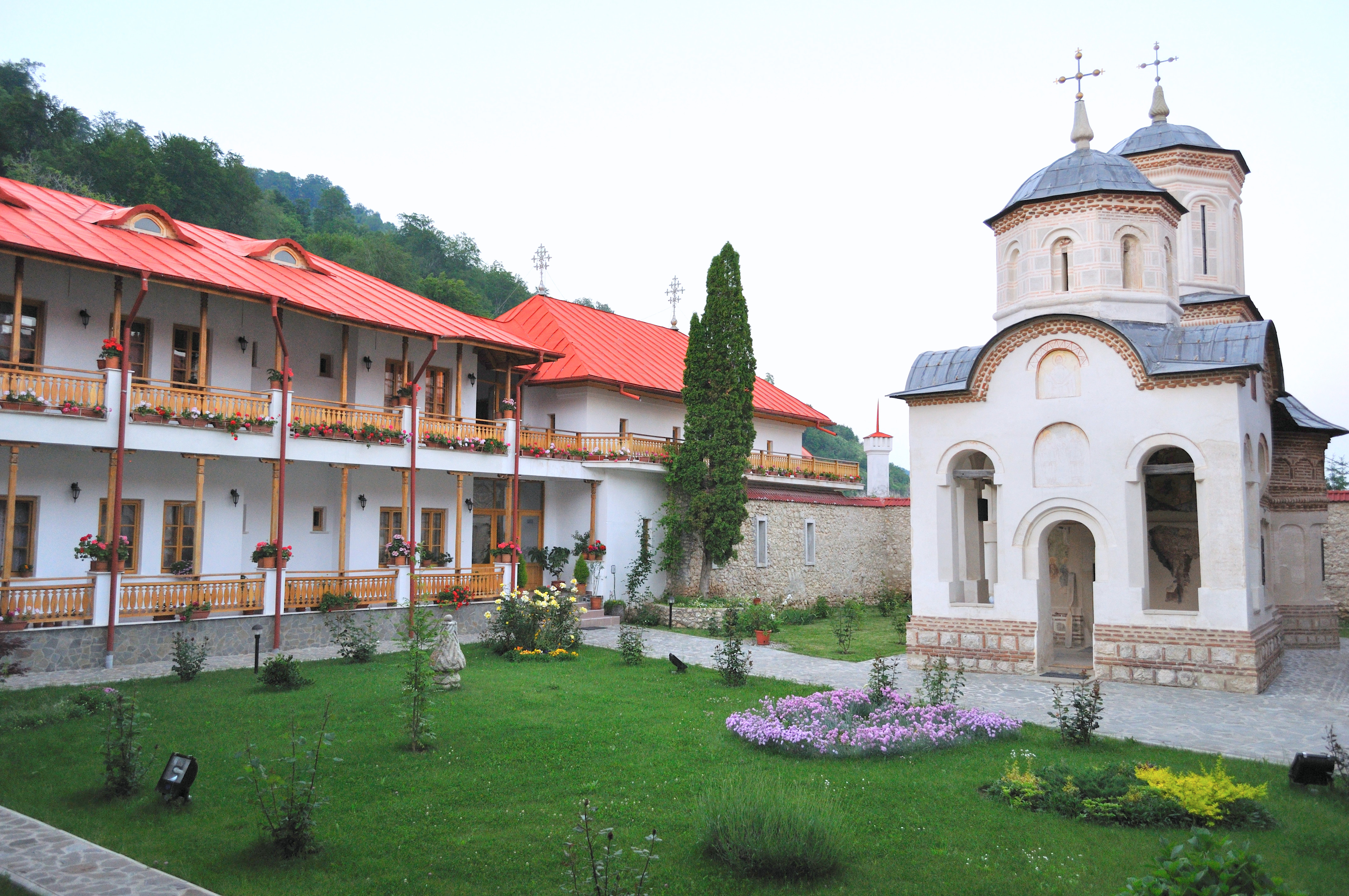 Mănăstirea Arnota, județul Vâlcea, monument istoric categoria A